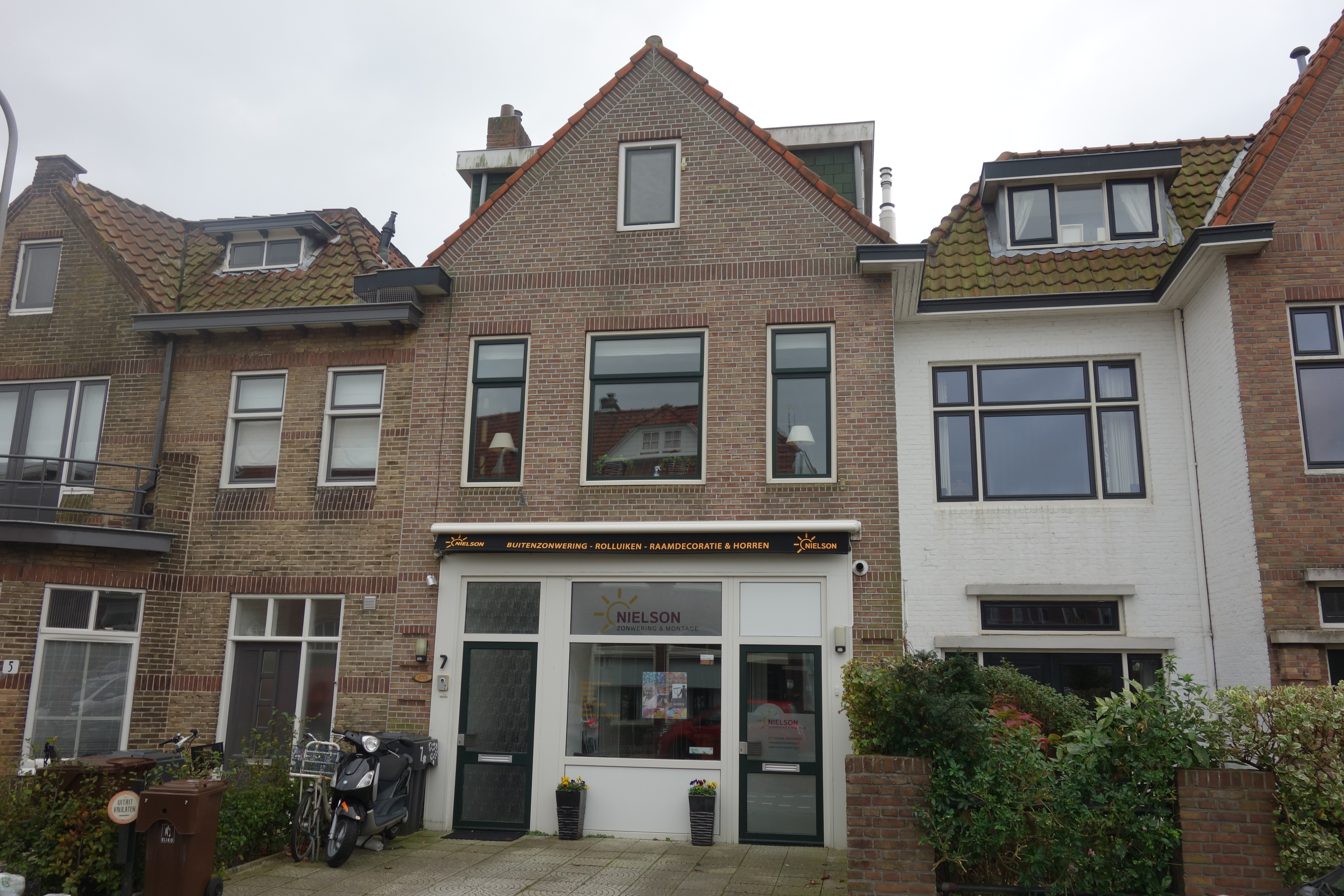 Geboortehuis van Jan Wolkers, Deutzstraat 7 te Oegstgeest (Nederland), anno 2017